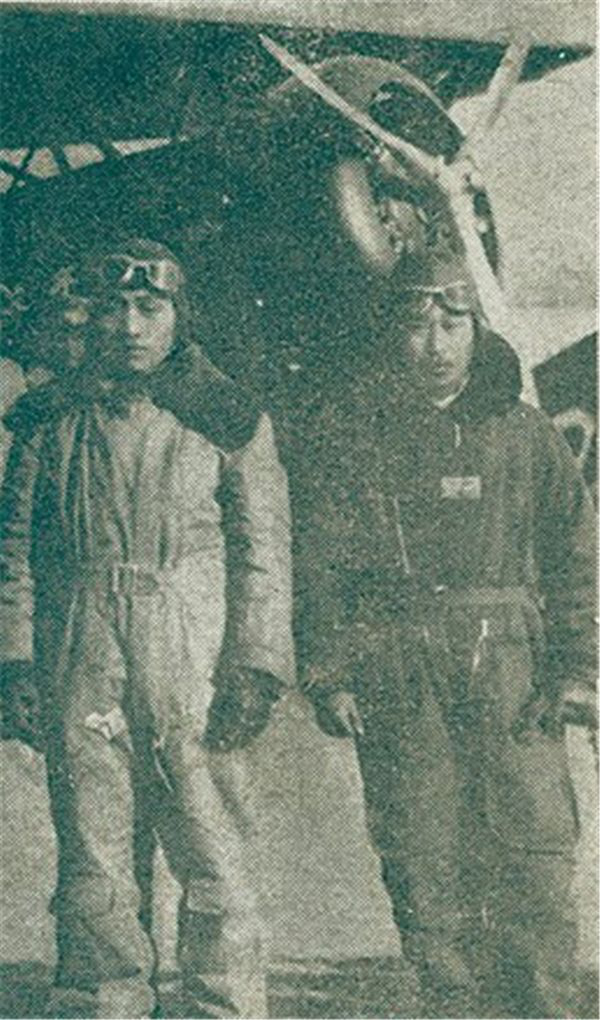 1936年10月30日攝於南京明故宮機場的高志航大隊長(右)與21隊隊長李桂丹上尉